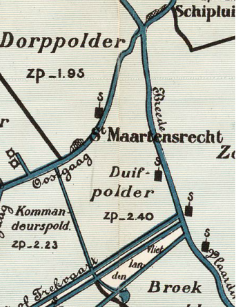 Duifpolder